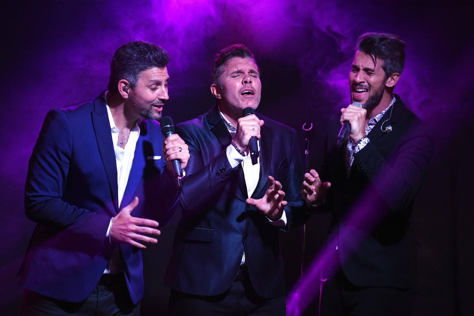 Fotografía de Destino San Javier, show realizado el sábado 3 de noviembre de 2018, en Quality Espacio de Córdoba, Argentina.